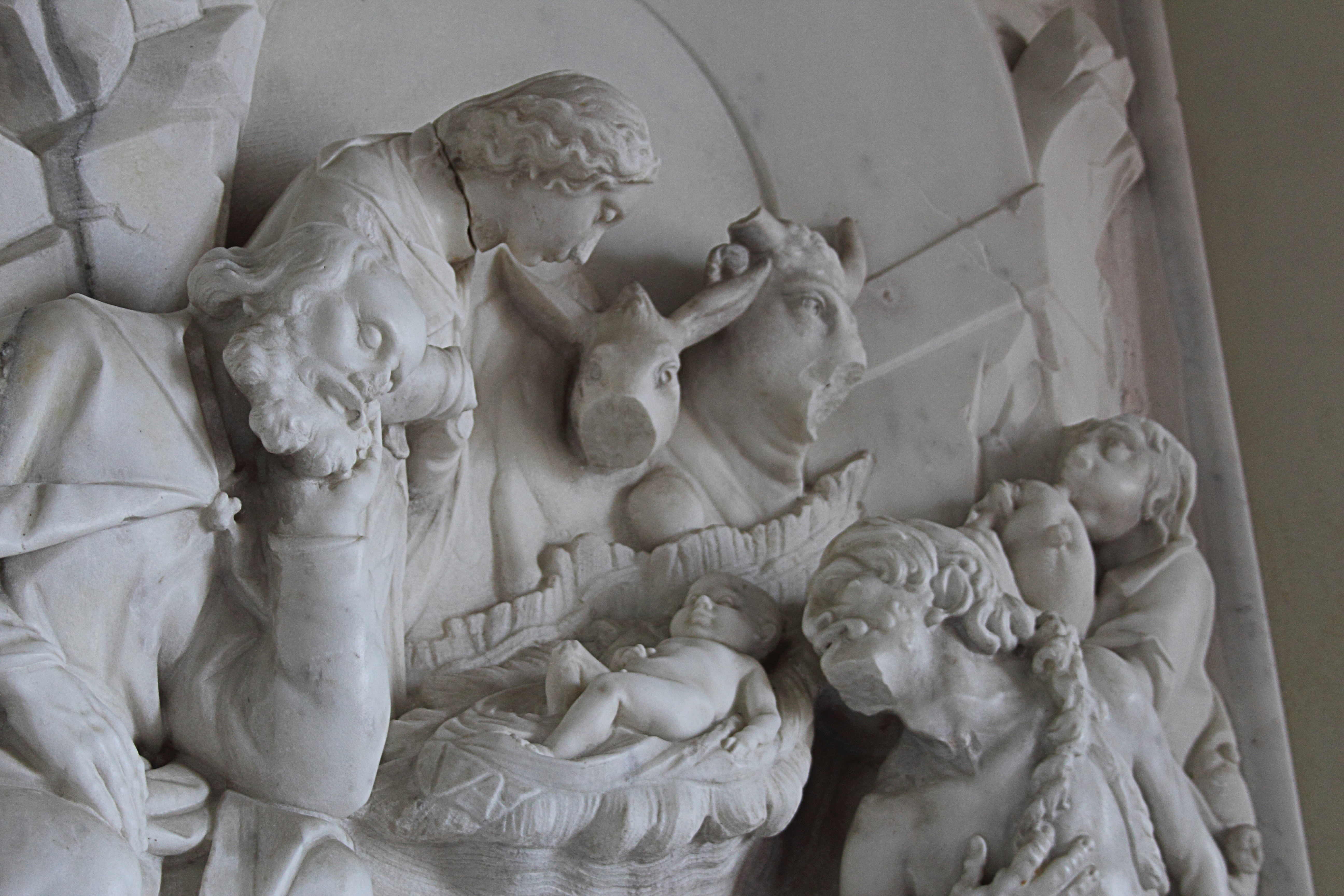 Convento di San Bernardino da Siena This is a photo of a monument which is part of cultural heritage of Italy.